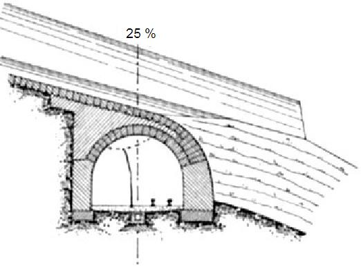 Lawinenabgänge auf die Gotthardbahn bei Wassen am 15. Februar 1888: Querschnitt mittlere Entschigtal-Gallerie bei km 62,91